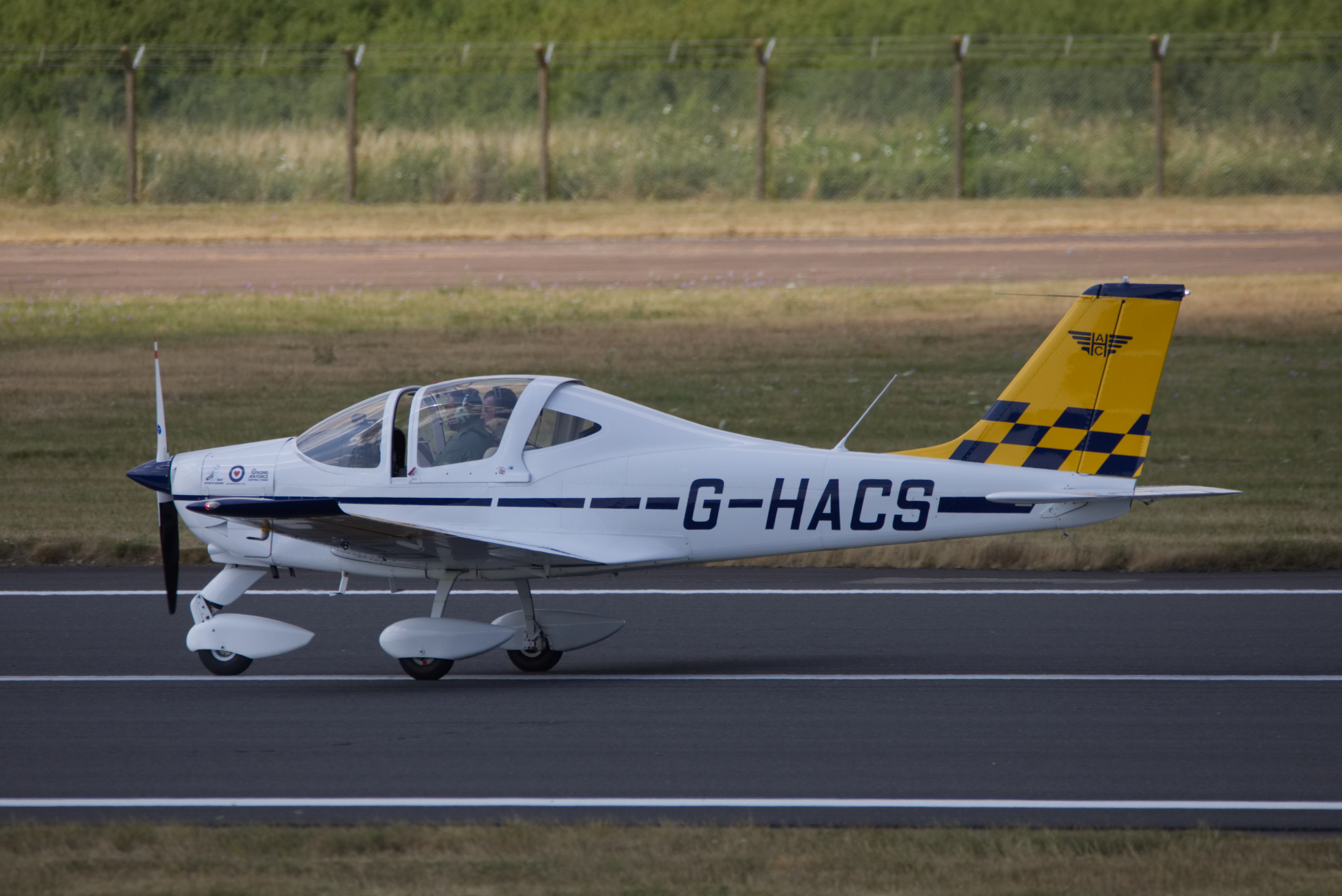 Tecnam P2002 5D4_0628